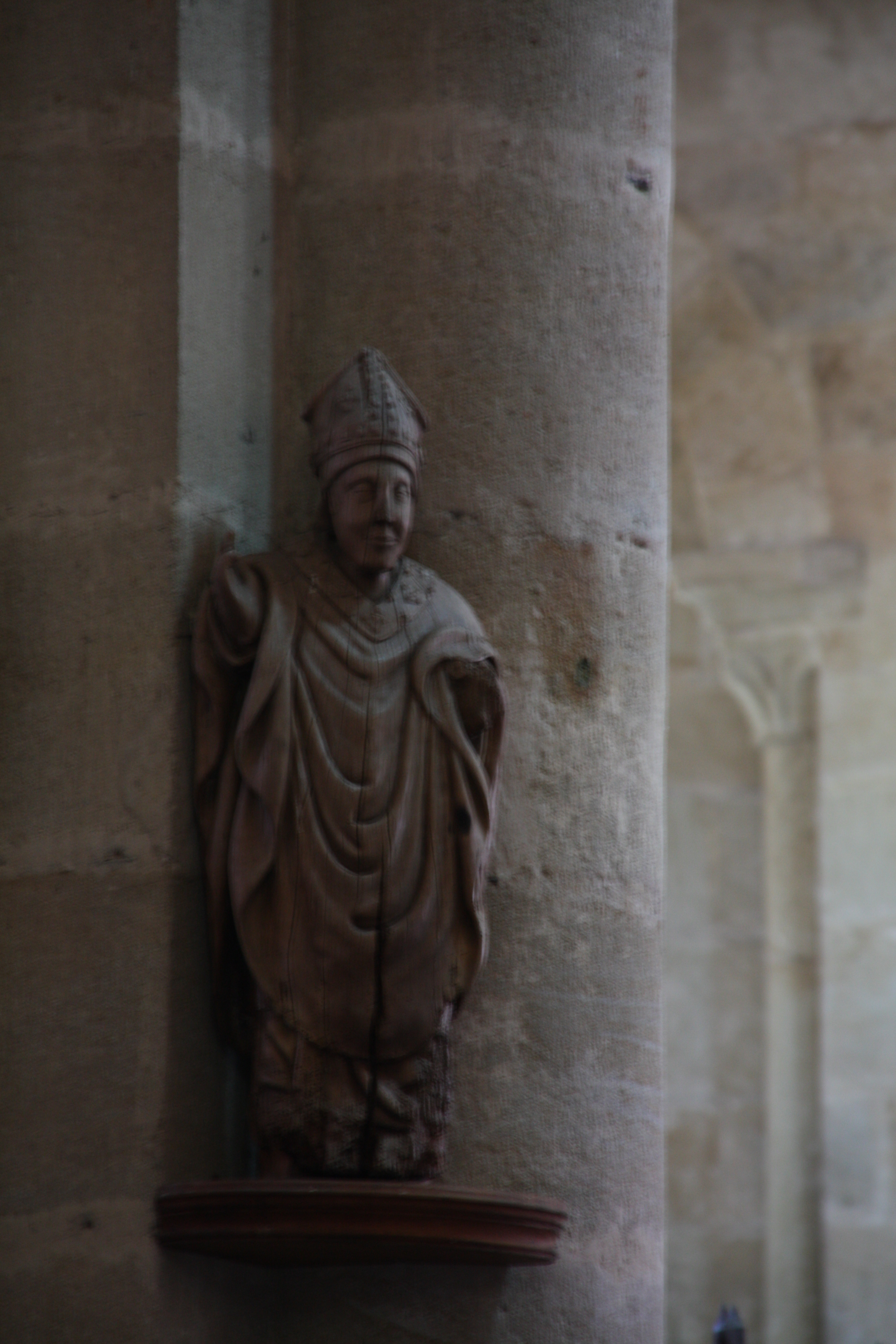 Église romane à Saint-Menoux, Allier, France